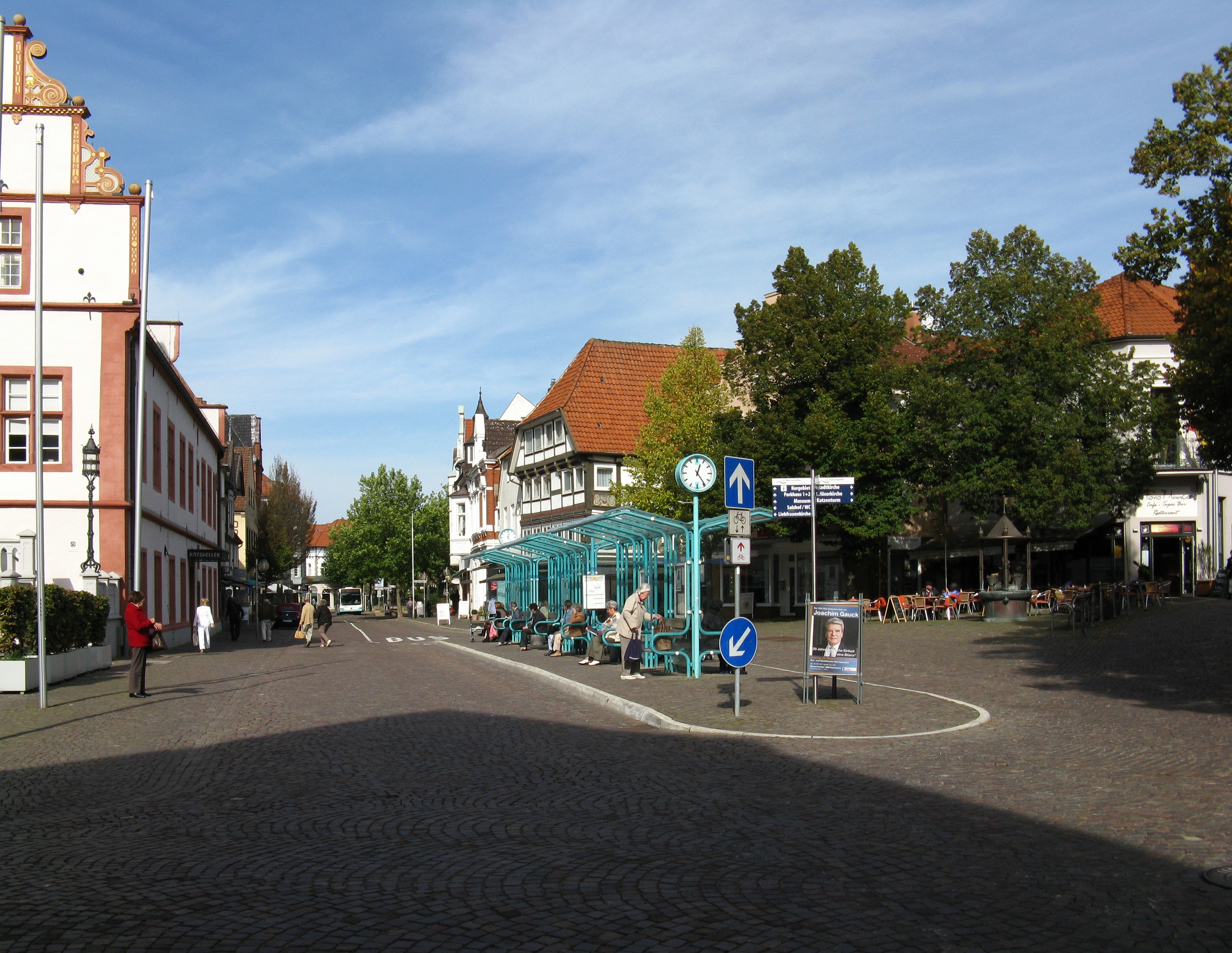 Bussteig am Markt in Bad Salzuflen